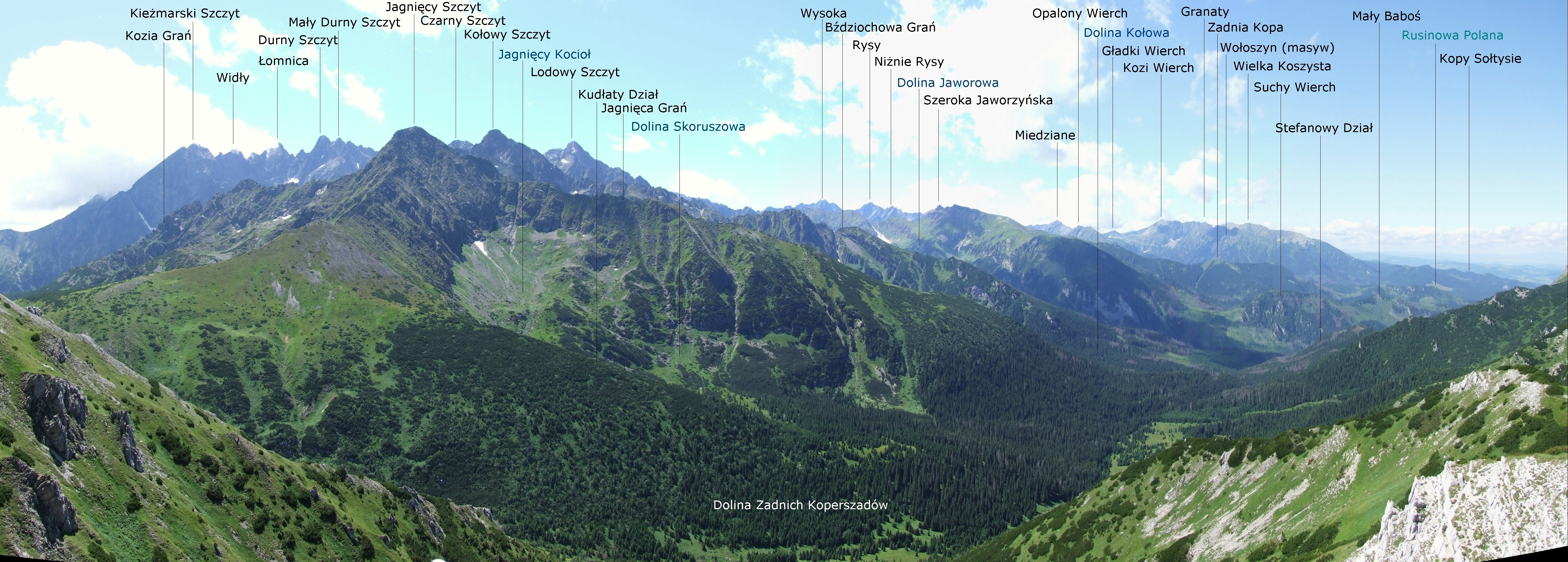 Panorama w kierunku południowym i zachodnim ze szlaku między Szeroką Przełęczą Bielską a Szalonym Przechodem